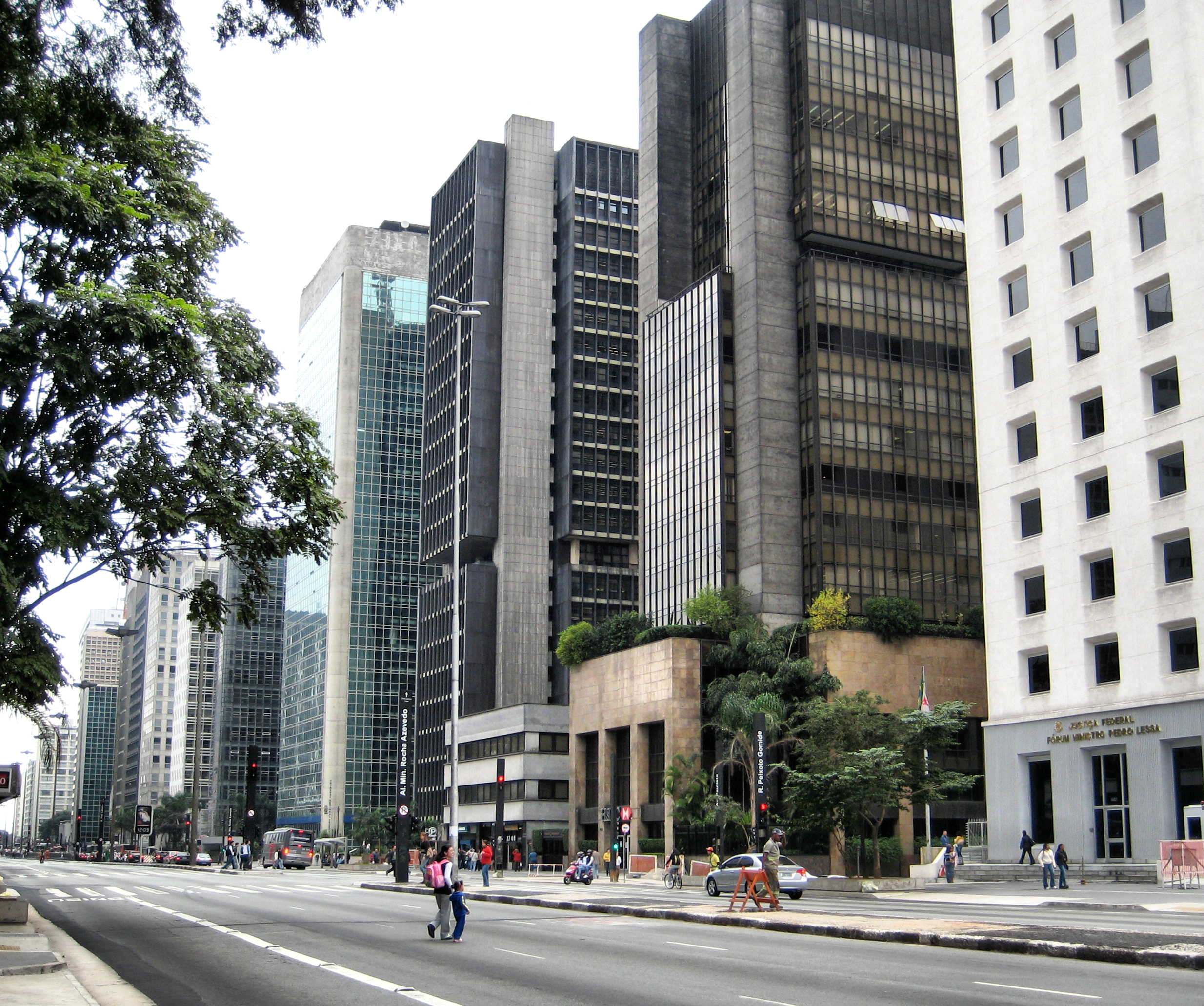 Avenida Paulista